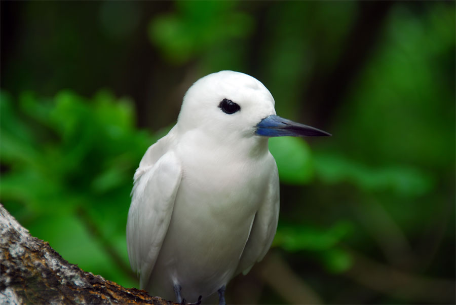 Rudy Bockaert en Françoise Gossey Seychellen 2006 Witte stern / Sterne blanche / White or fairy tern (Gygis alba)